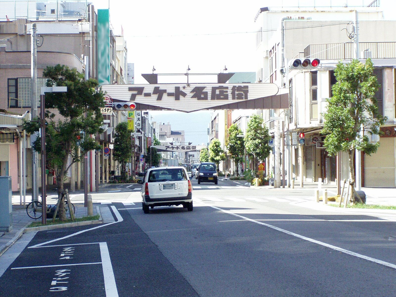 "ArcadeMeitengai" street in Numazu shizuoka Japan.